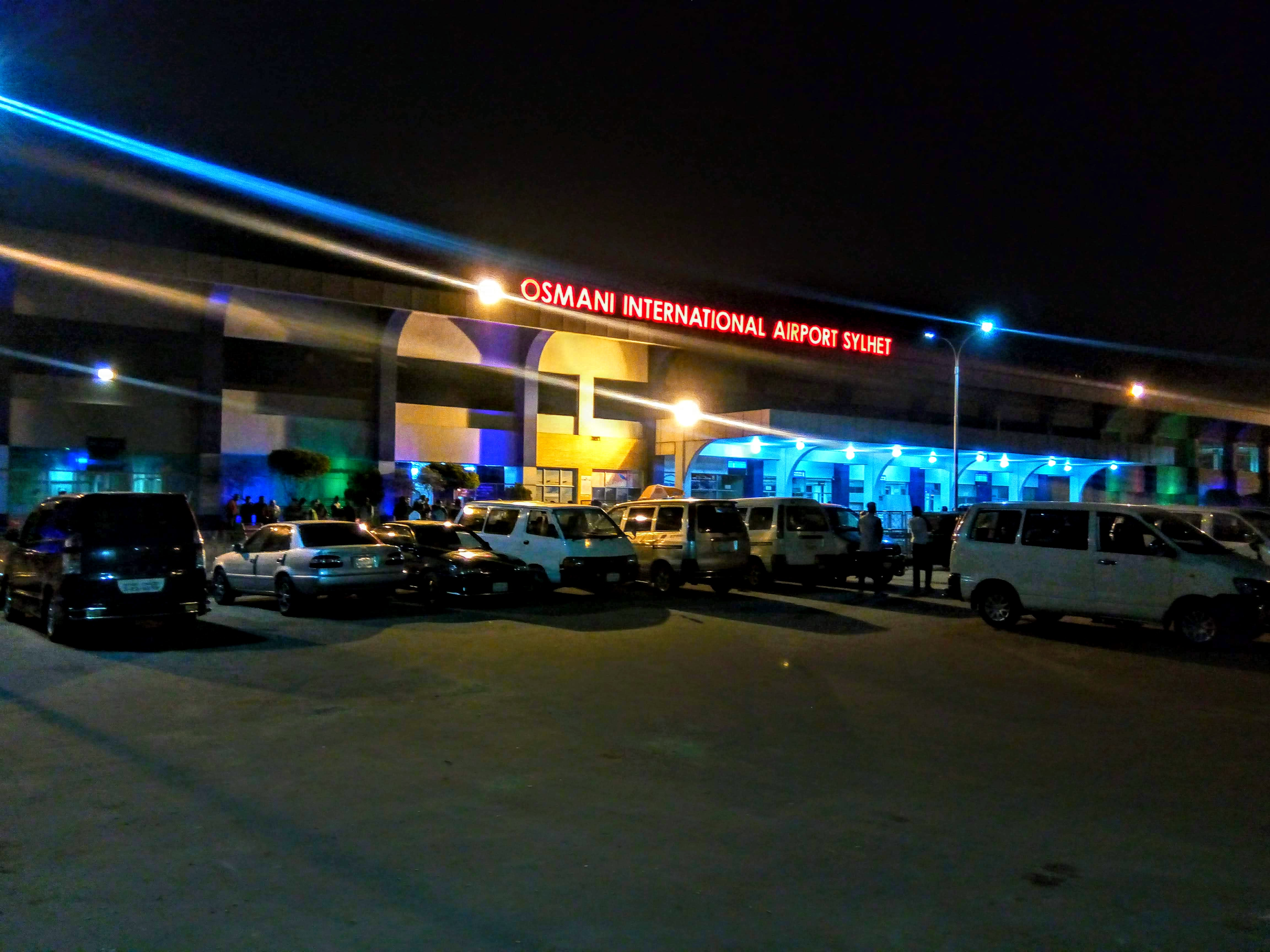 ওসমানী আন্তর্জাতিক বিমানবন্দর